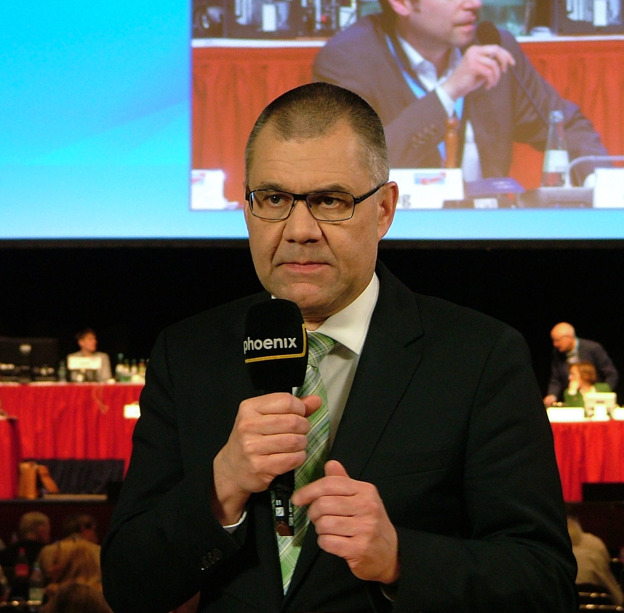 AfD Bundesparteitag am 23. April 2017 in Köln, MARITIM Hotel